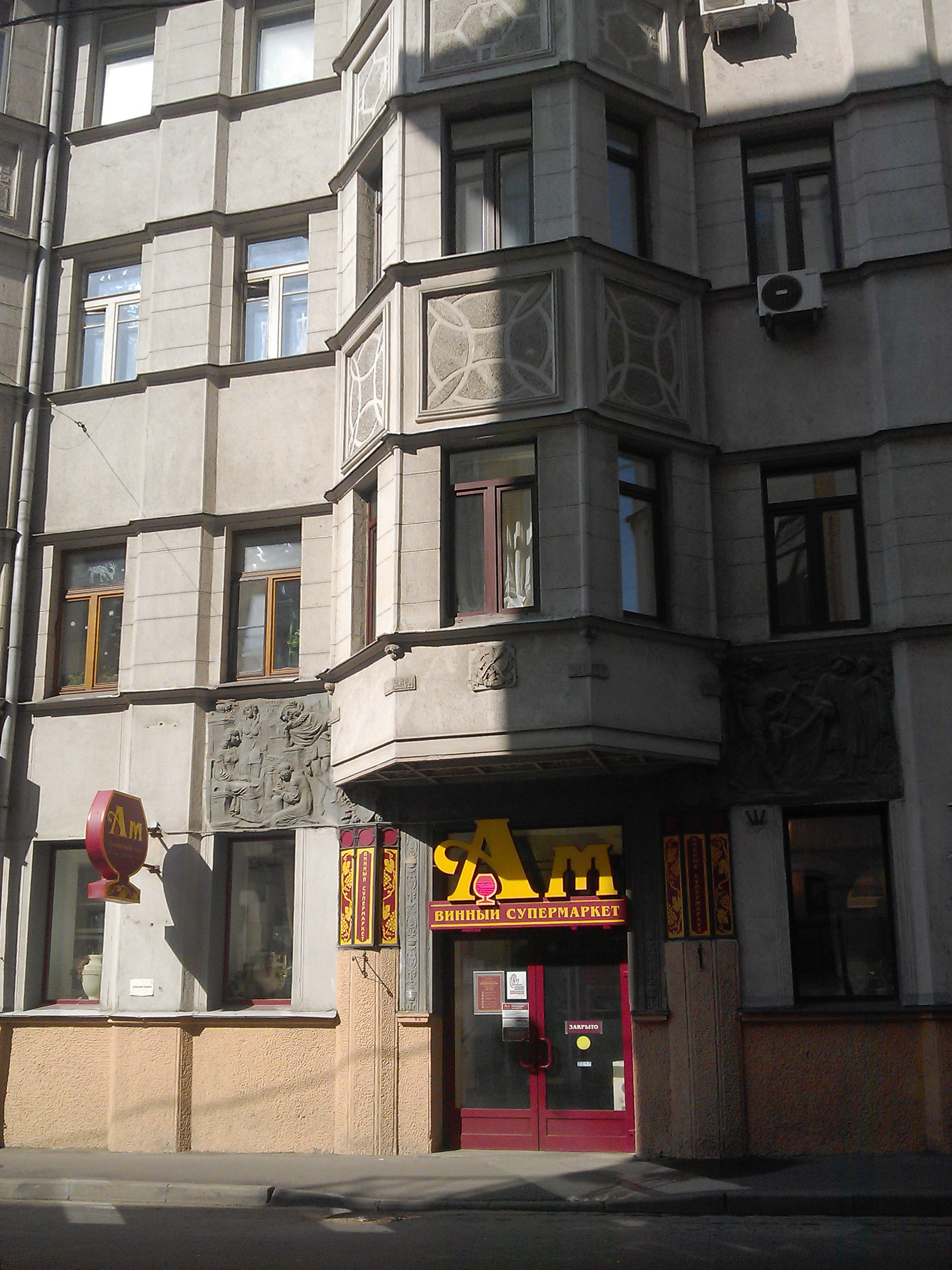 Nikolopeskovsky Lanes